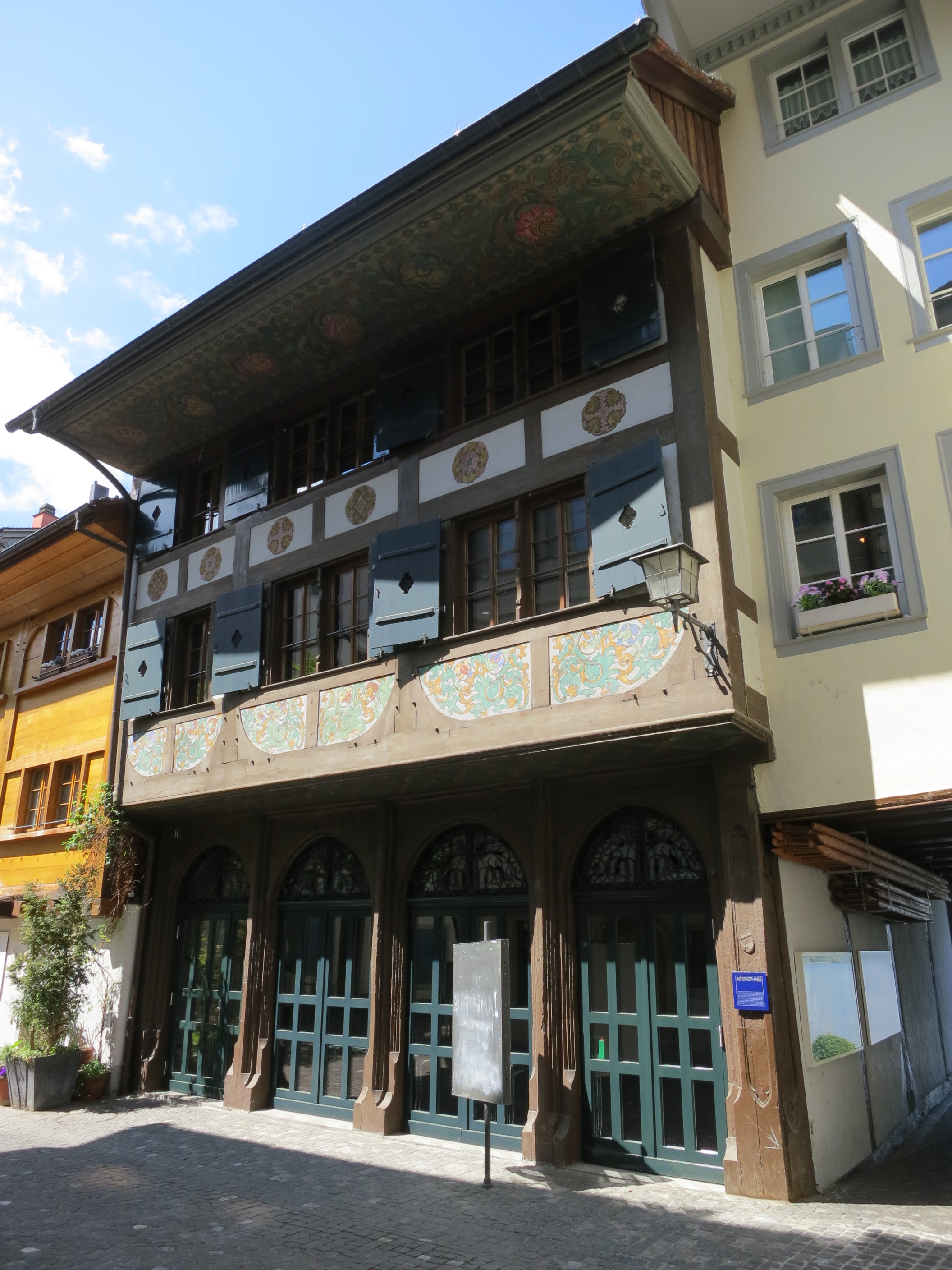 Altstadthalle, Zug ZG, Schweiz